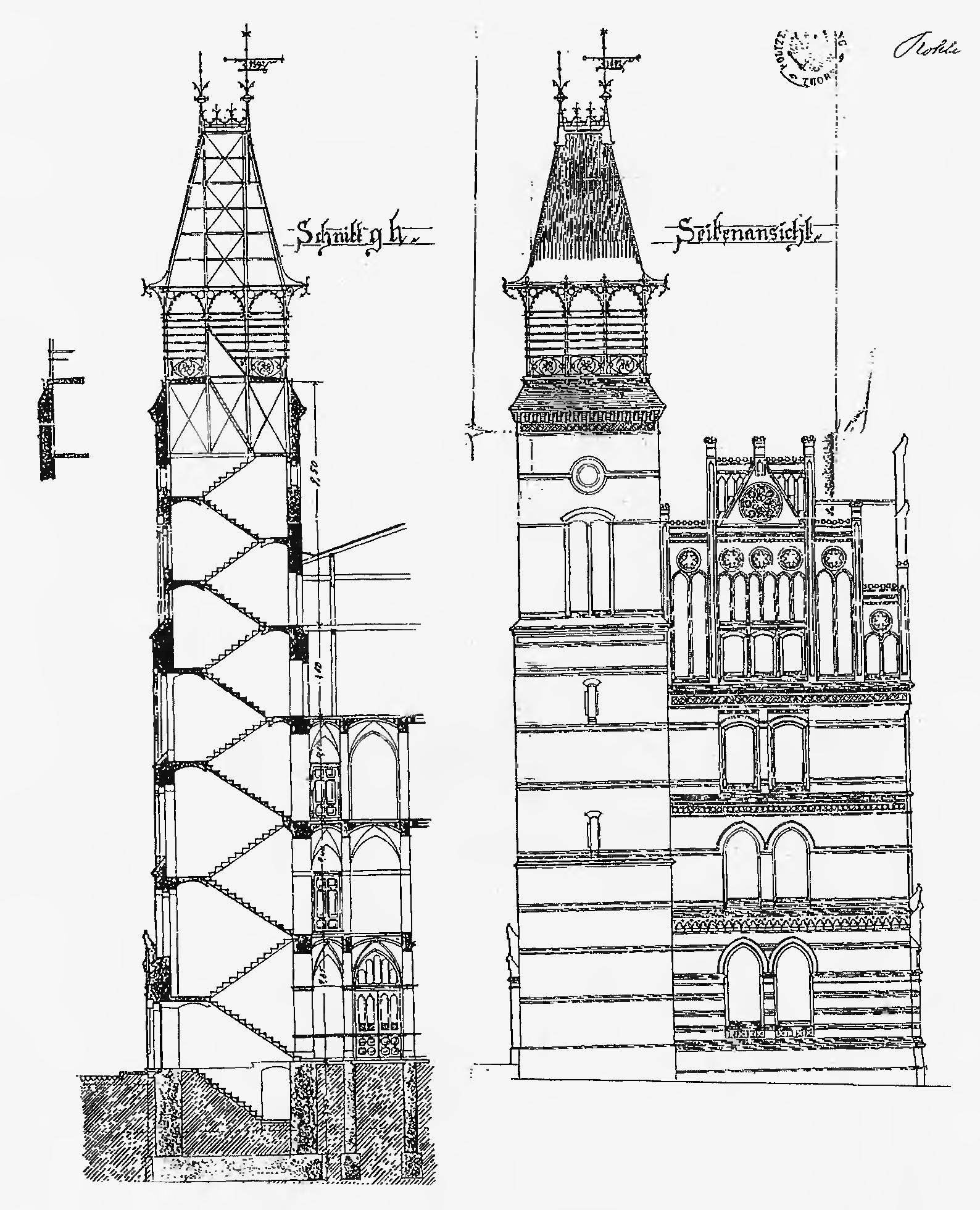 Projekt elewacji południowej urzędu pocztowego w Toruniu po rozbudowie